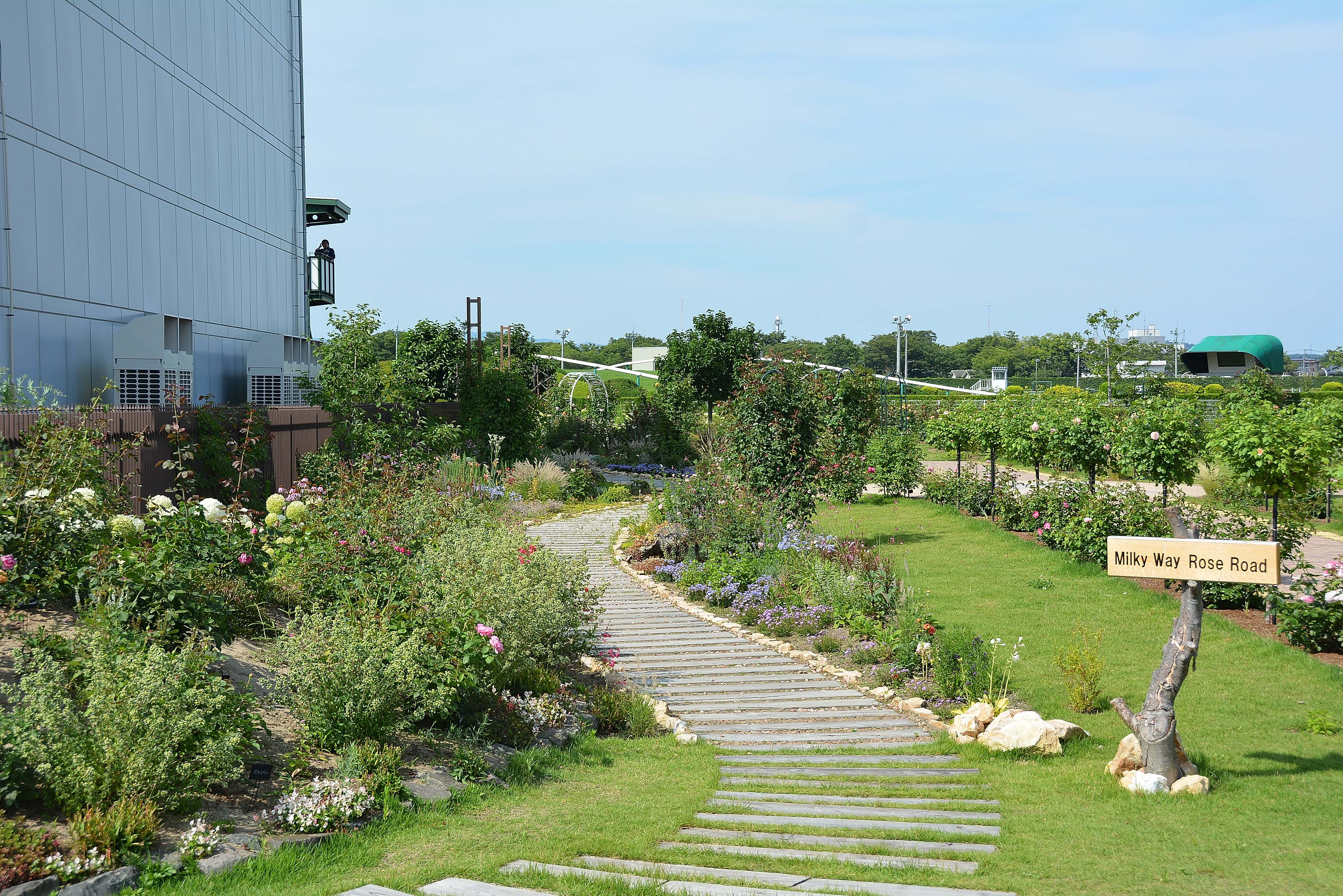 福島競馬場の馬場内広場にあるターフビジョン裏へ設けられている「ローズガーデン」を、馬場内広場にて撮影したもの。